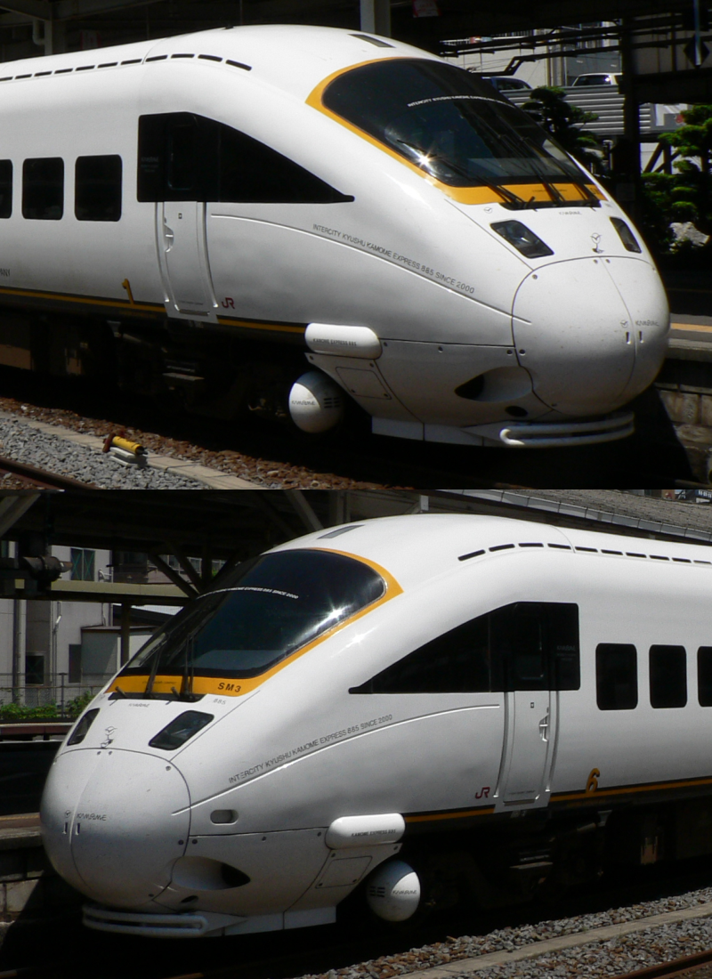 JR九州885系SM3編成の先頭車。上はクロハ884-3(1号車)。下はクモハ885-403(6号車。事故で廃車となったクモハ885-3の代替車)。クモハ885-403では2次車同様、ワイパーの本数が2本になり先頭部側面にステップが追加された。